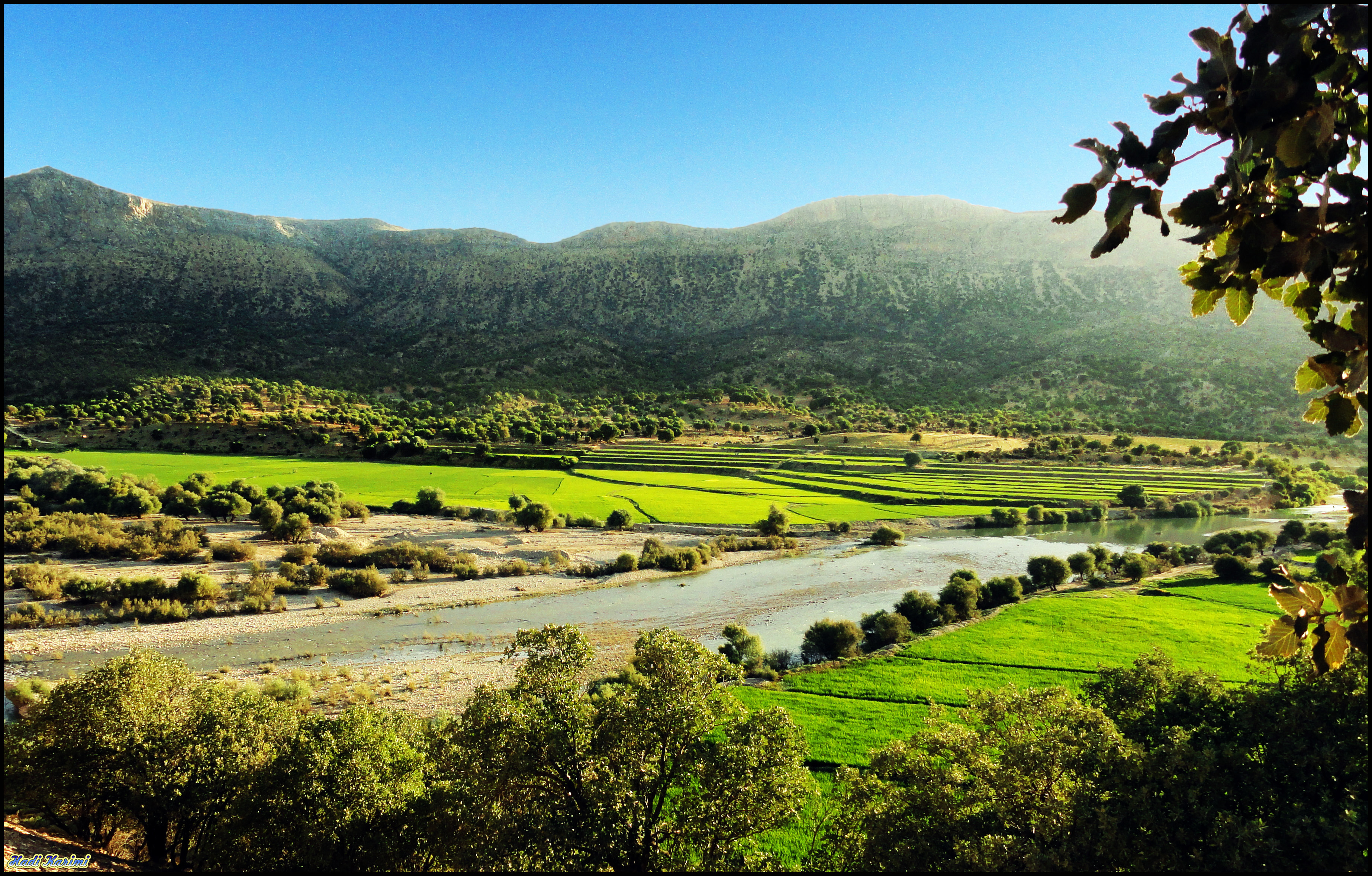 Paddies around Kor River, Kamfirouz شالیزارهای اطراف رود کر، کامفیروز